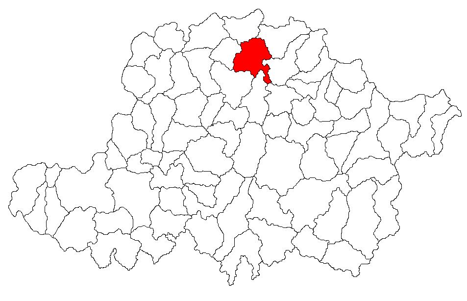 Categorie:Hărţi ale judeţului Arad